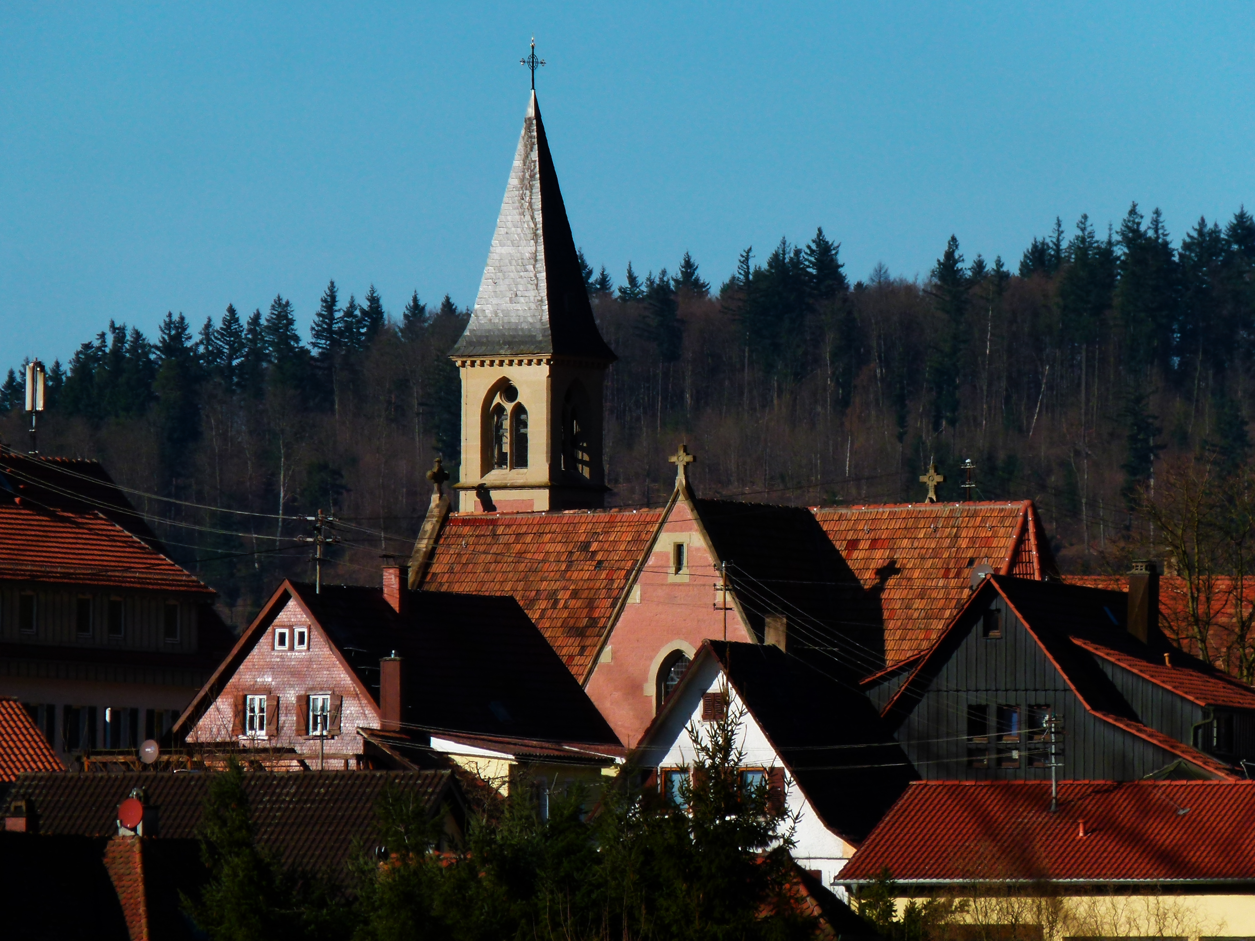 Church Of Unterreichenbach